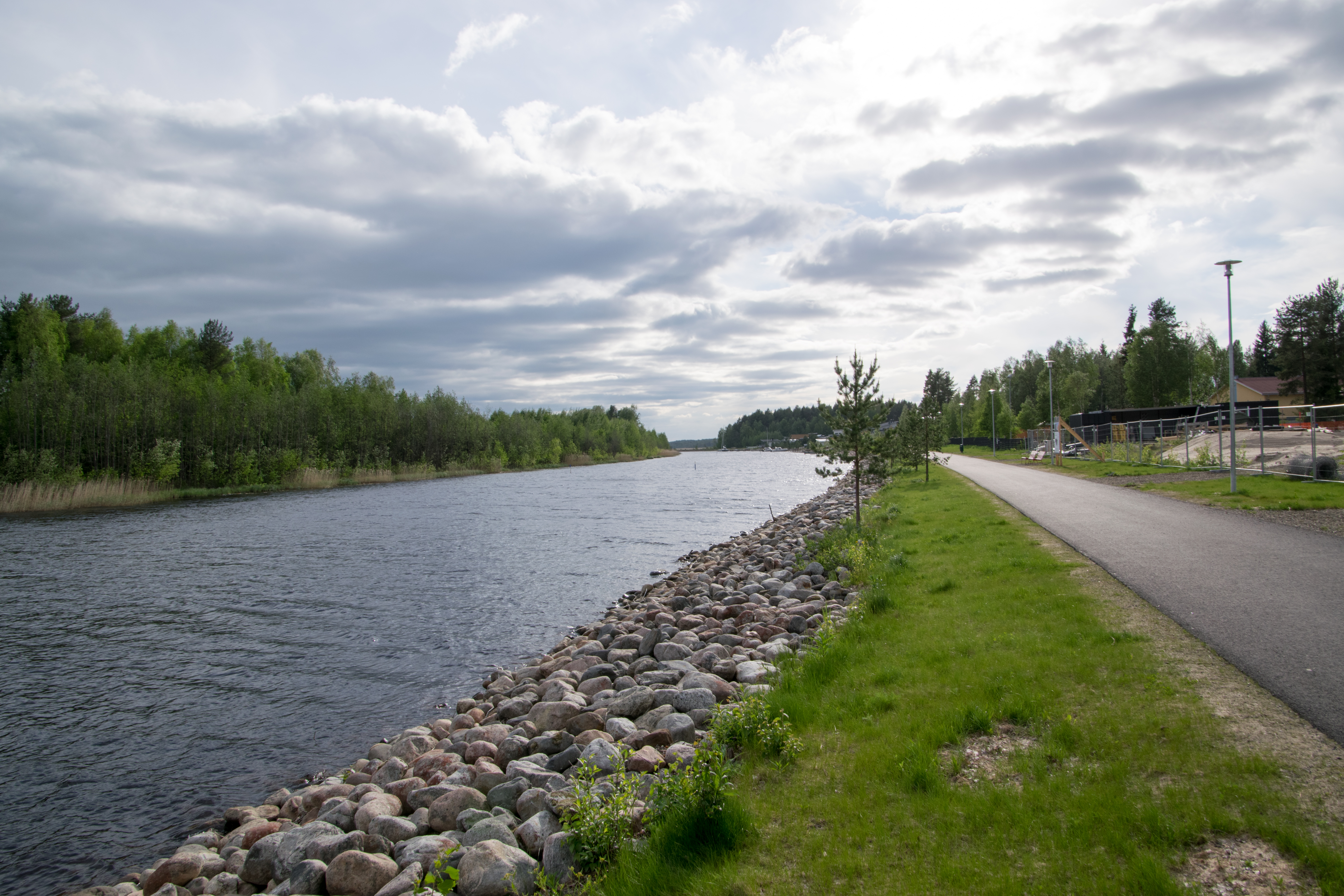 Marjalan kanava